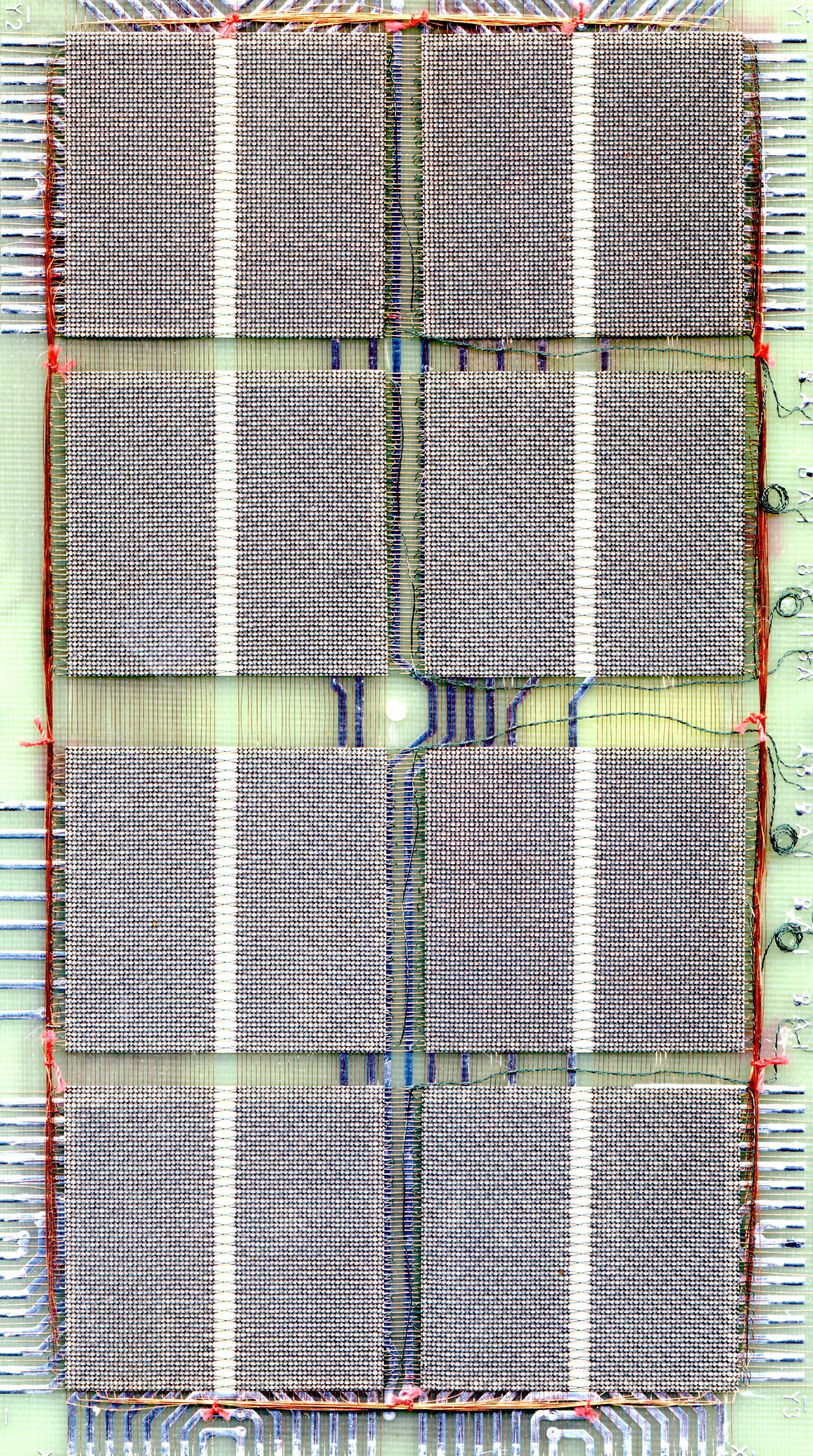 Carte mémoire tores de ferrites Logabax 4 Kilo-Octets Ordinateur Logabax de 1975